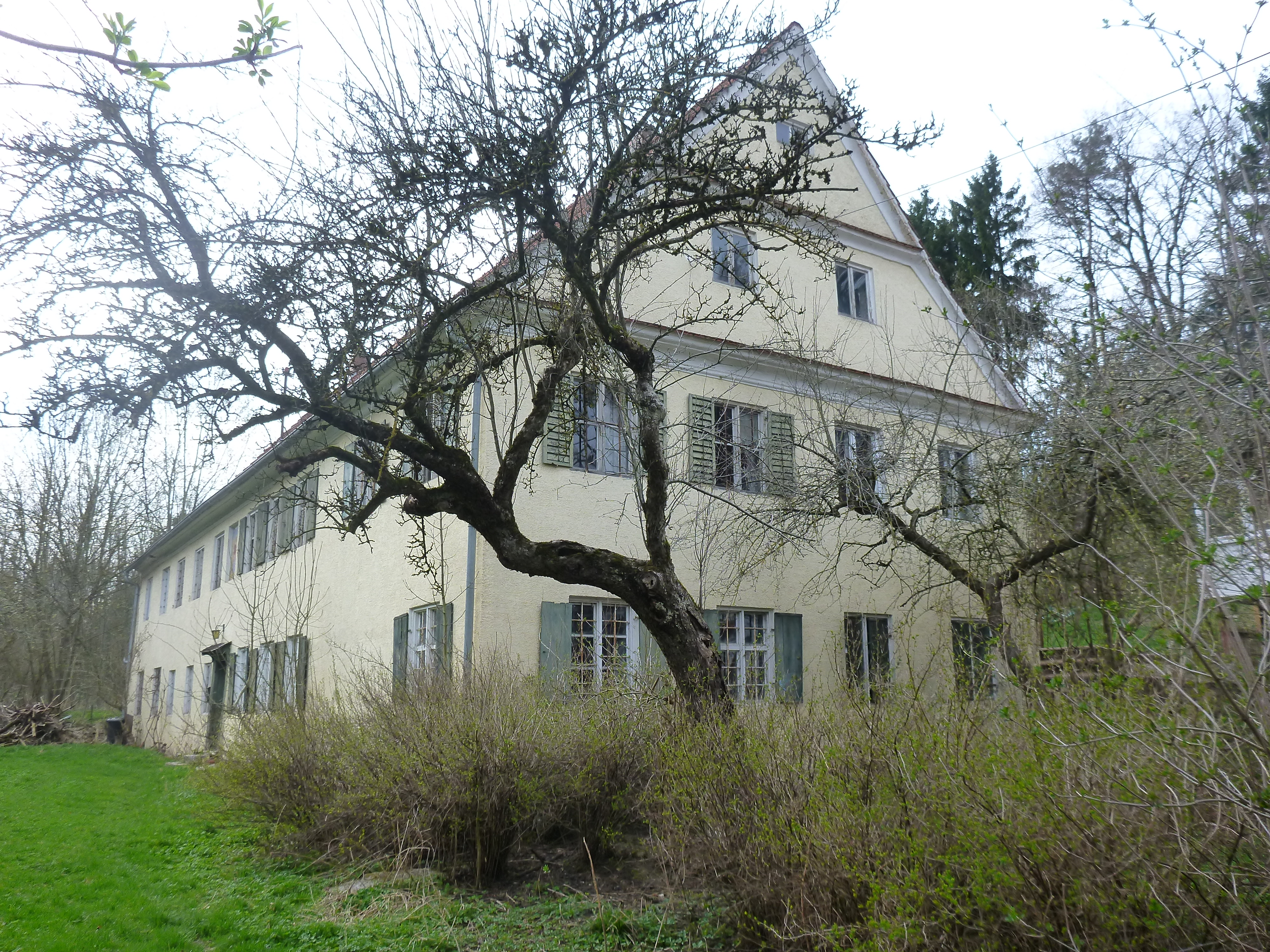 Ehem. Verwalterhaus des Klosters, langgestreckter Satteldachbau, im Kern um 1650 (dendro 1651), um 1730 verlängert und umgestaltet (dendro 1728); an der Südseite Wandbild; Innenräume z. T. stuckiert.